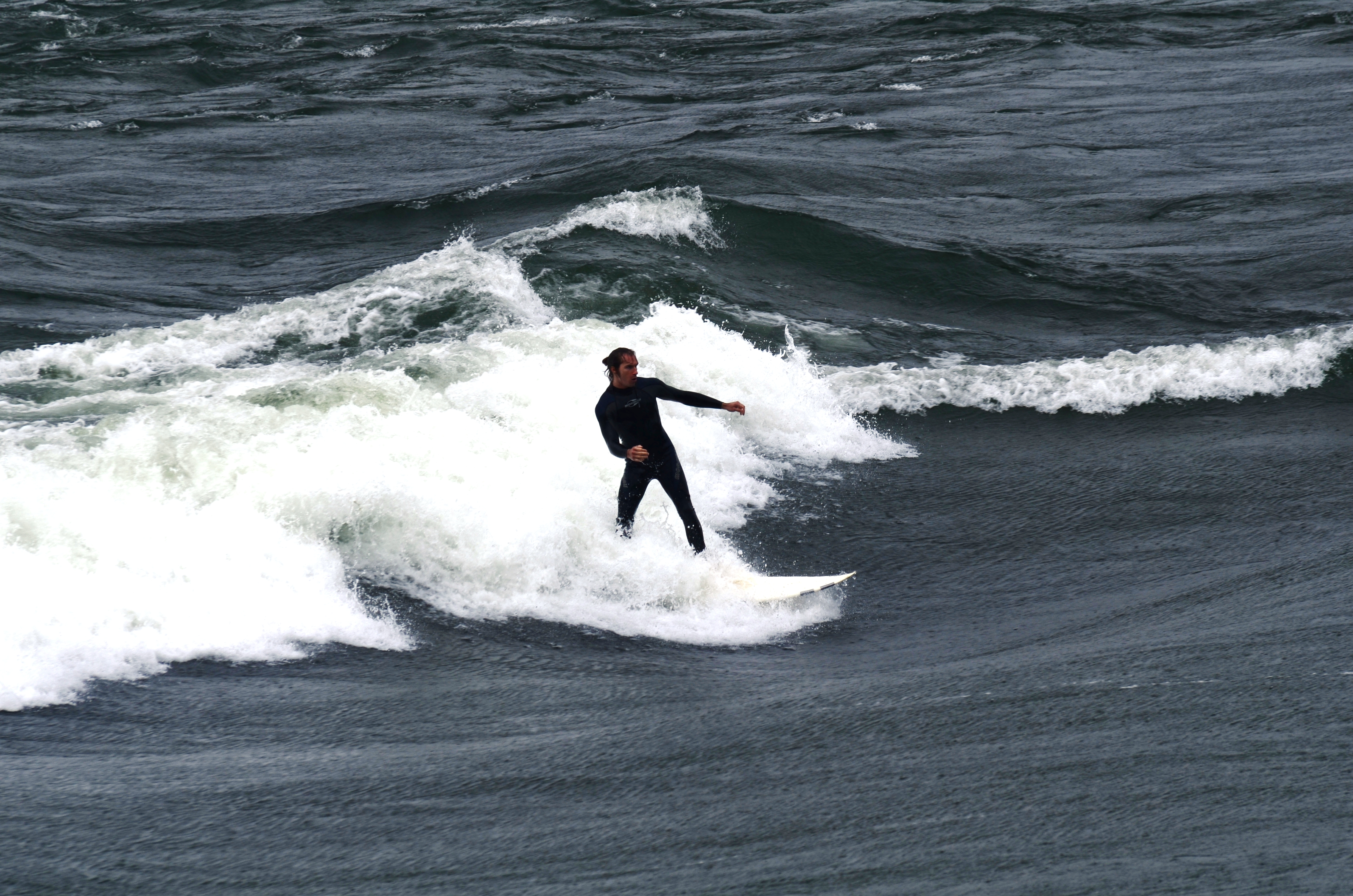 Vague Habitat 67 (surfeurs) in Montréal